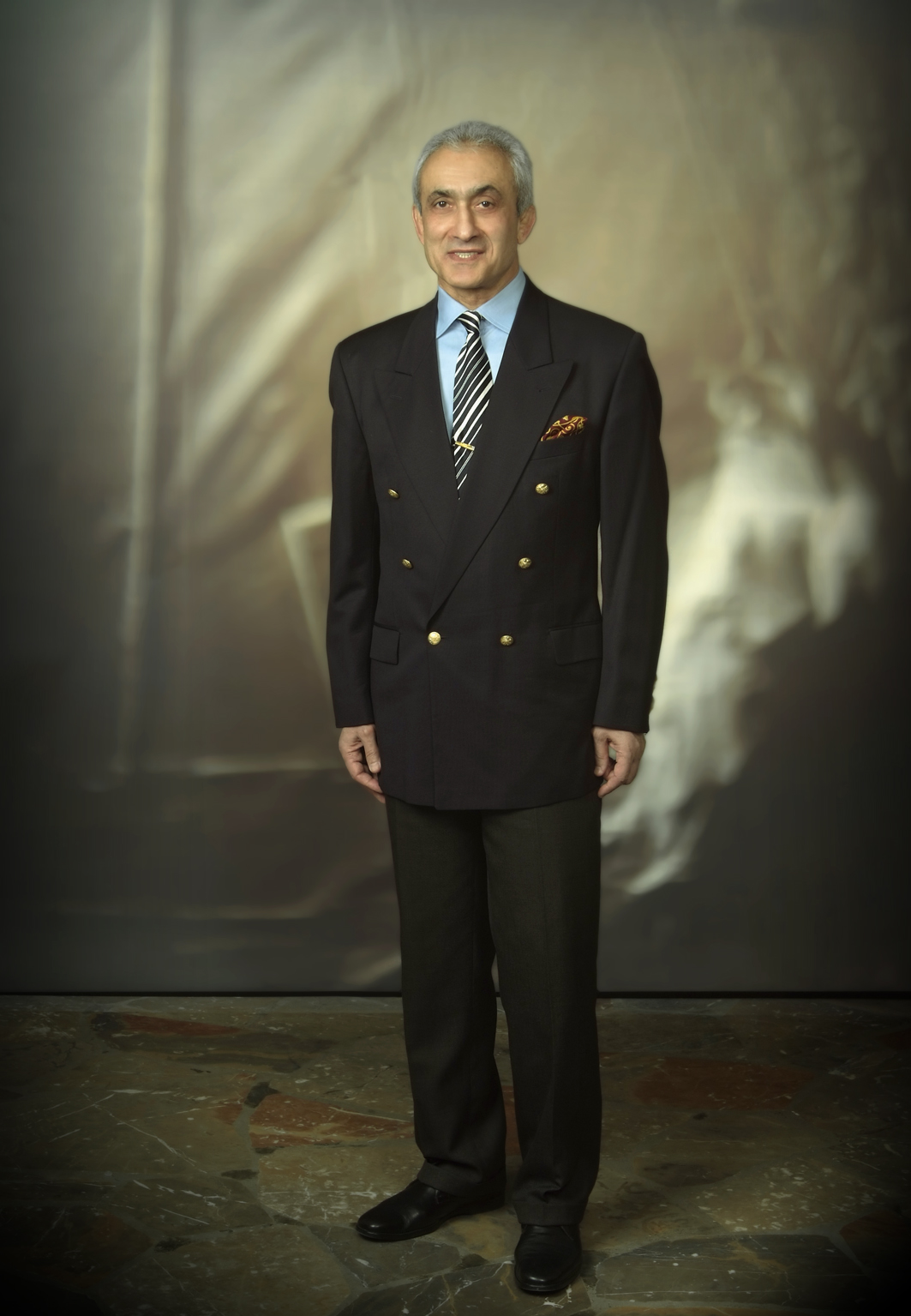 Махир Джавадов Зальцбург Австрия 2010 год